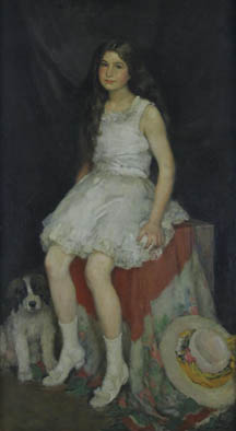 Portrait de: Milča Mayerová